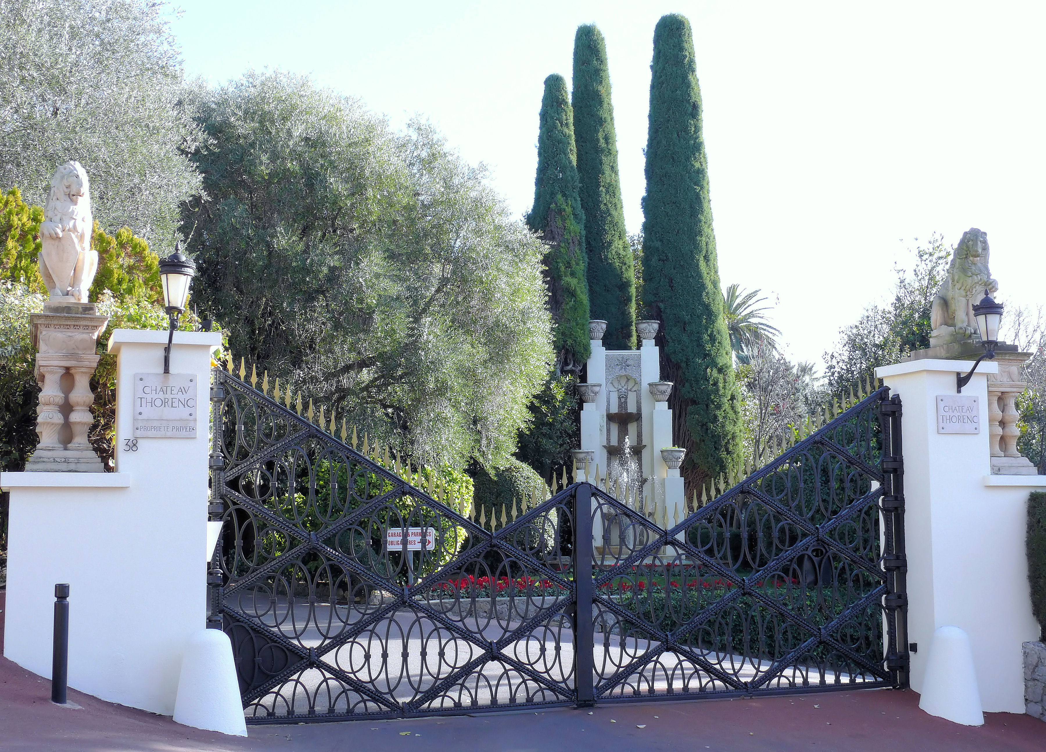 Cannes - Château Thorenc, 38 boulevard d'Oxford et 12 avenue d'Annam - Entrée ouest réalisée en 1932 pour Albert Neubauer. L'empereur d'Annam Bao Daï en est propriétaire de 1937 à 1960.